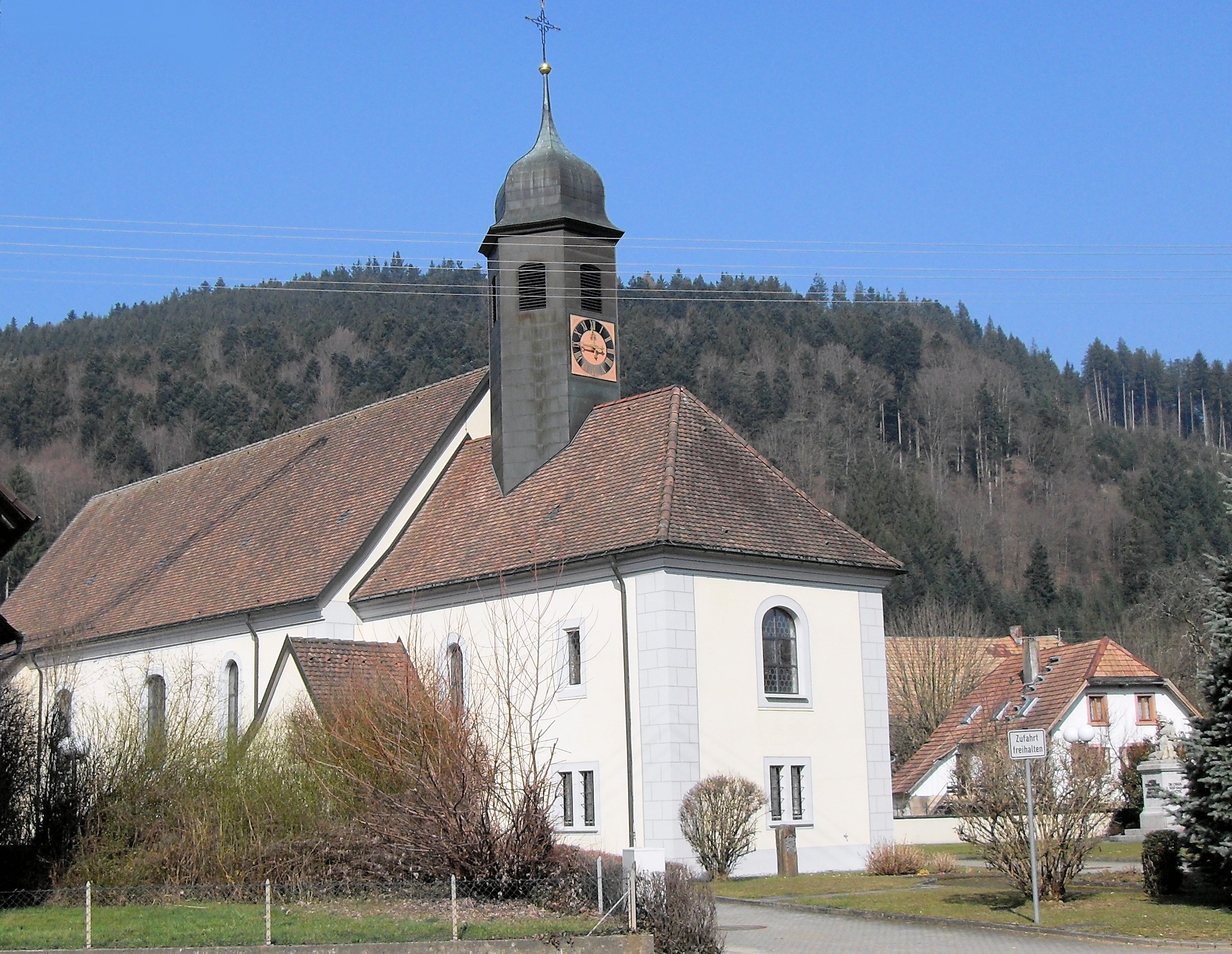 Kirche St. Leonhard in Niederwinden, Gemeinde Winden im Elztal, Landkreis Emmendingen